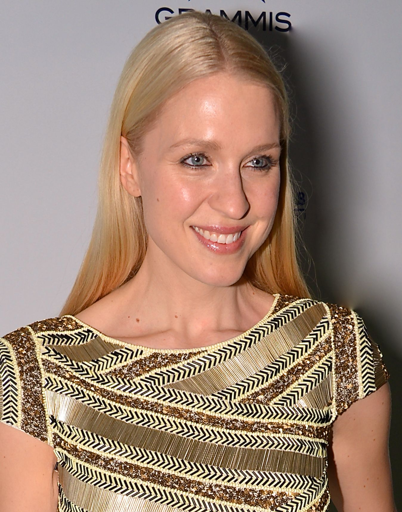 Emilia de Poret på Grammisgalan på Cirkus, Stockholm den 20 februari 2013.